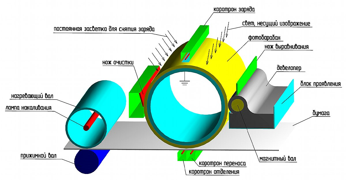 Схематичное изображение элементов электрографического аппарата (принтер, или копир).